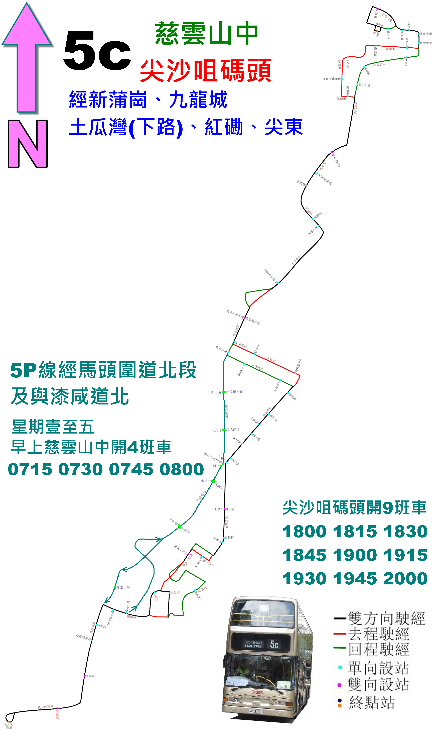 中文（香港）: 九巴5C線的走線圖